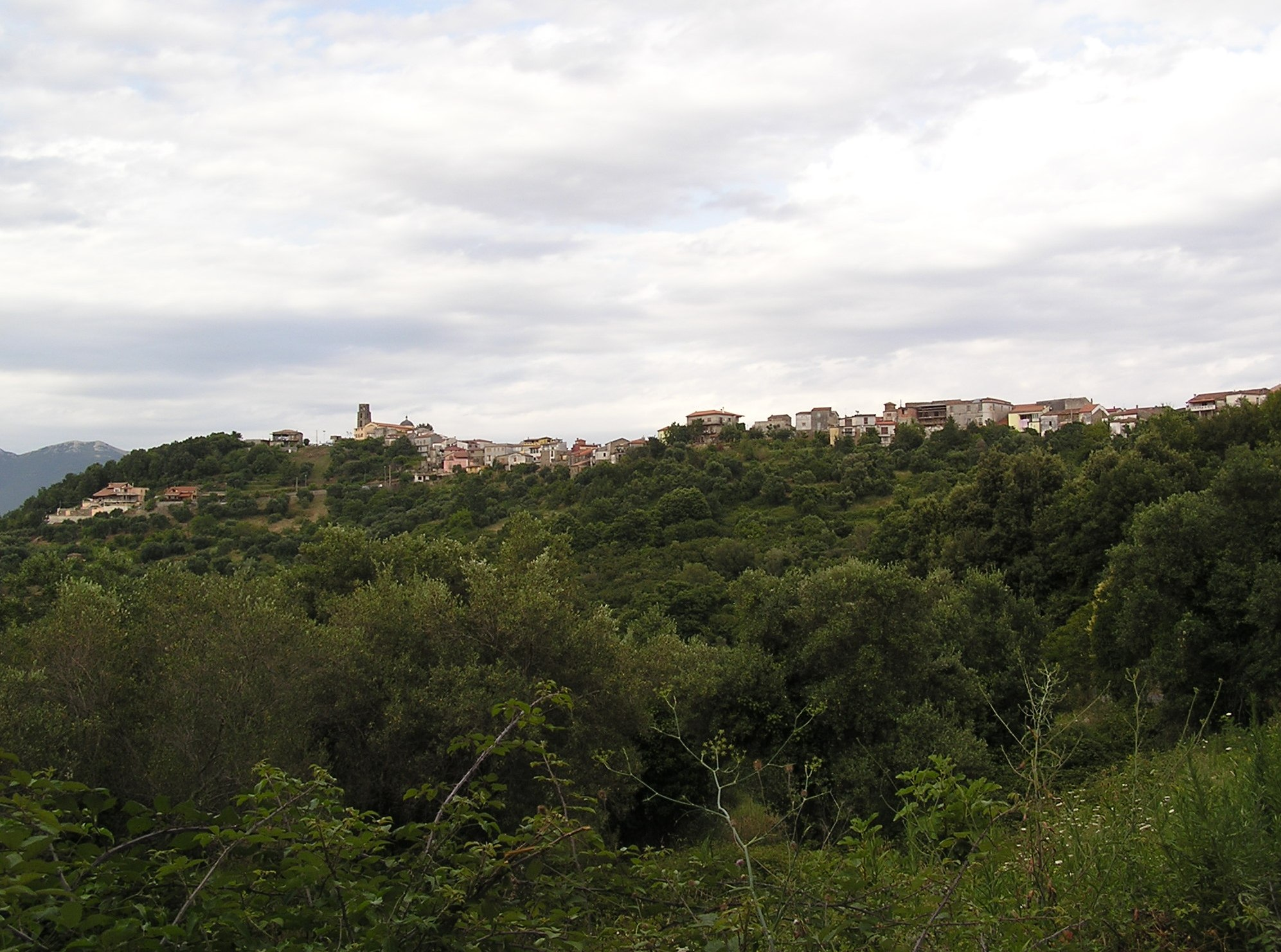 Veduta del paese di Perito.